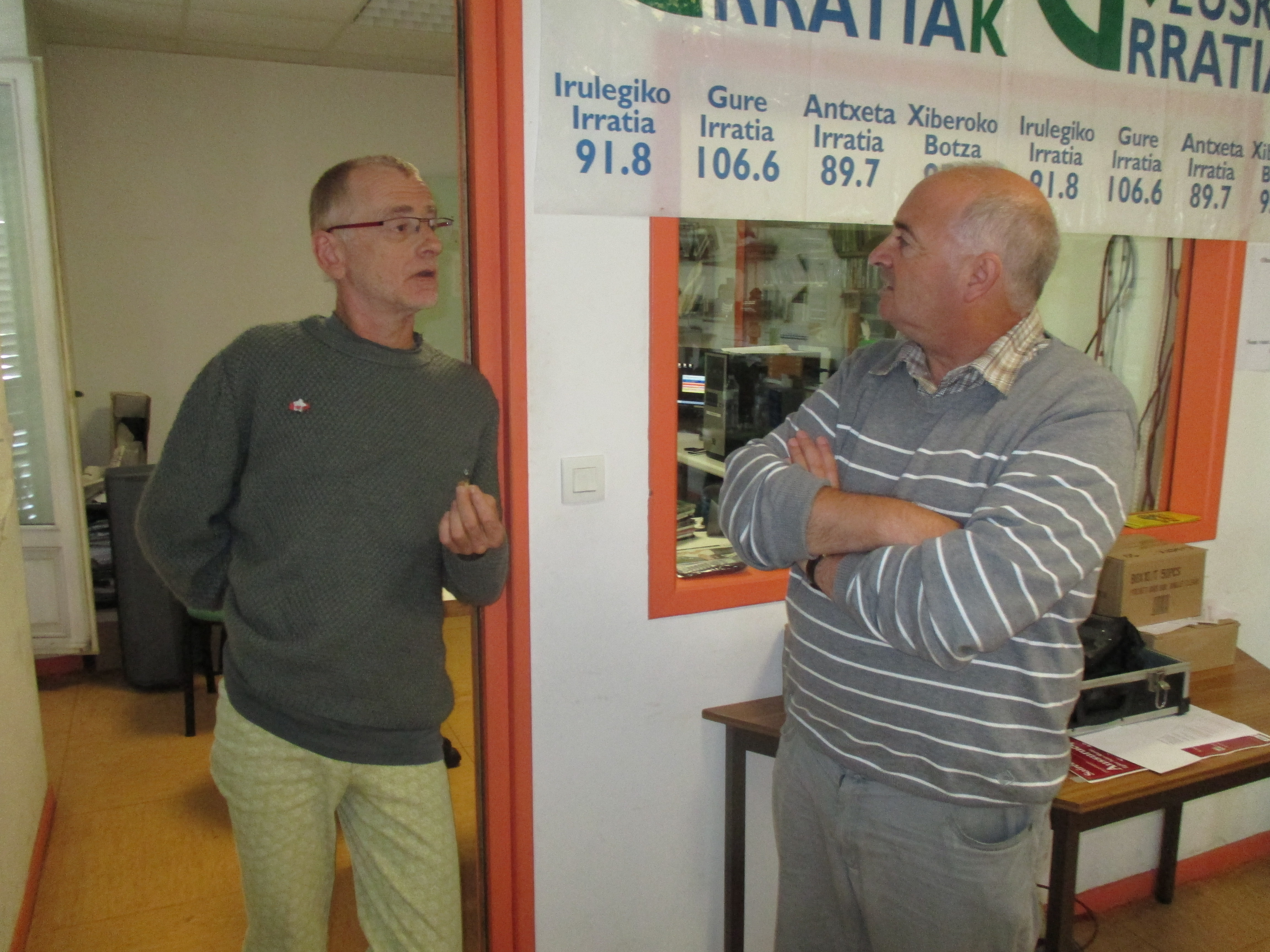 Ttittika Rekalt eta Allande Sokarros kazetari zuberotarrak, Xiberoko Botza emisoran (Maule).